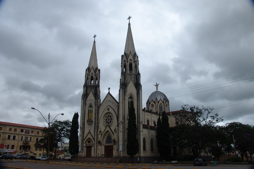 Imagem do município de Botucatu, estado de São Paulo, Brasil.